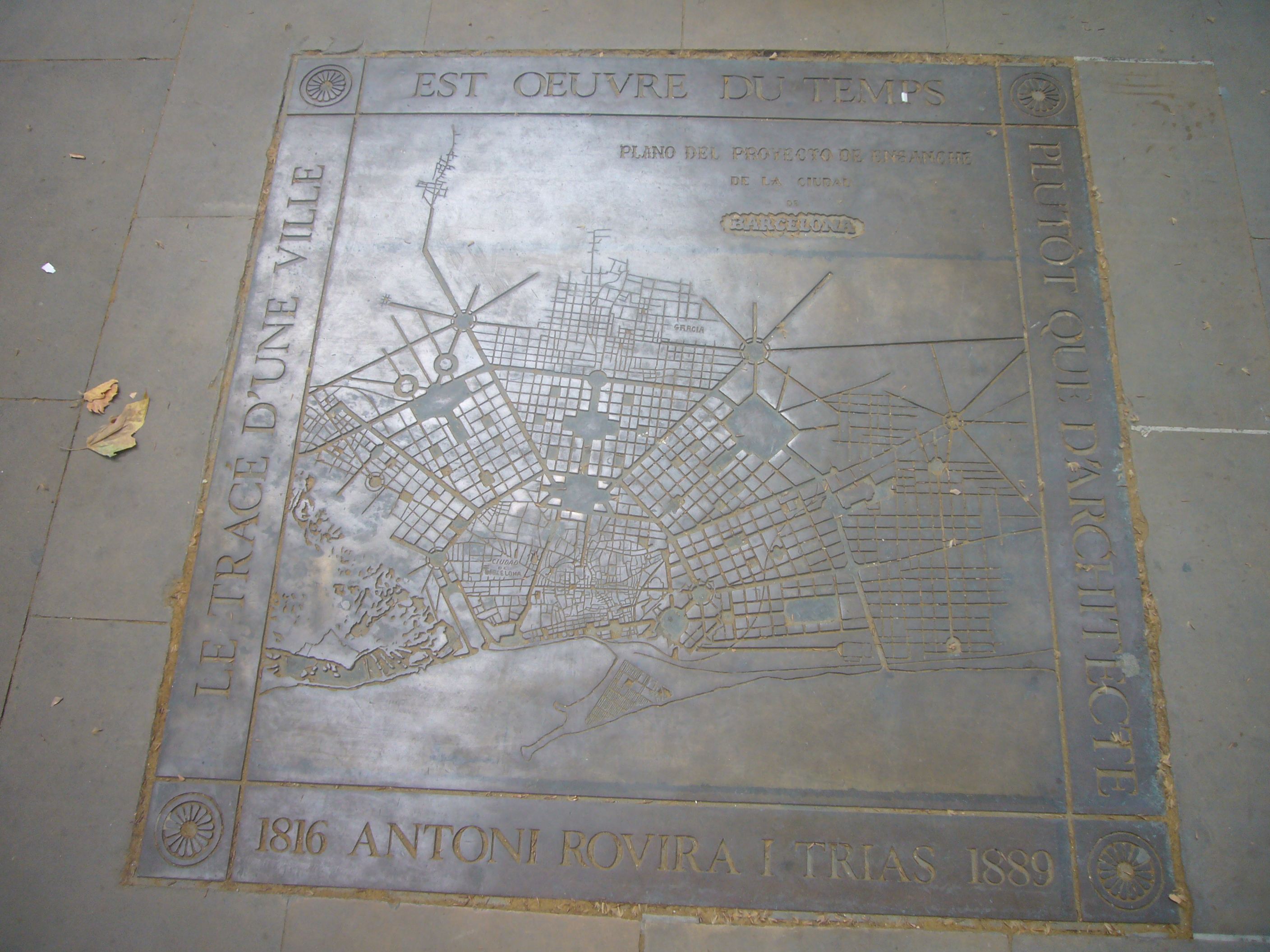 Placa amb el projecte de l'Eixample de l'arquitecte Antoni Rovira i Trias. Situada al paviment de la plaça Rovira i Trias, davant l'escultura del personatge.